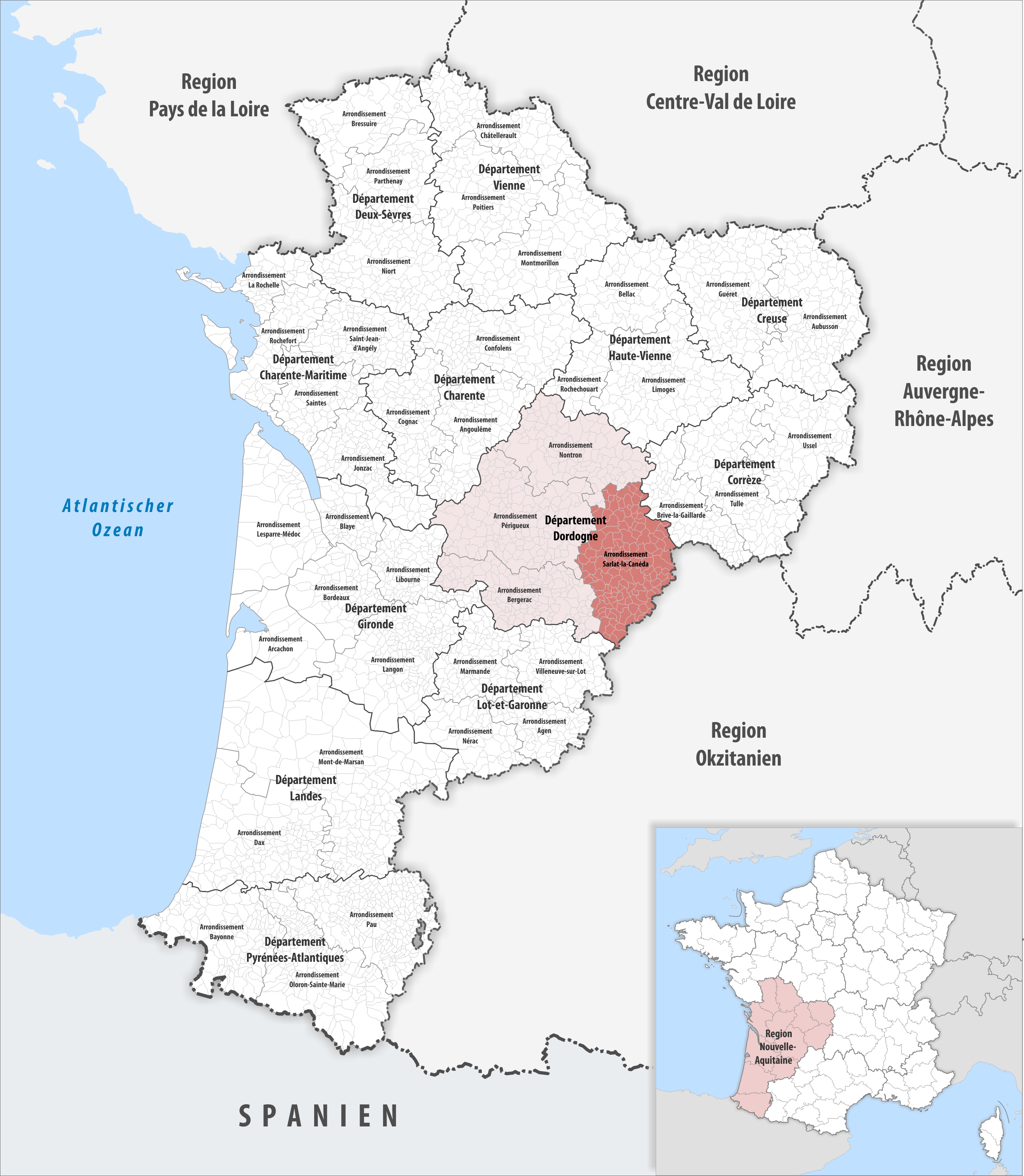 Lage des Arrondissements Sarlat-la-Canéda